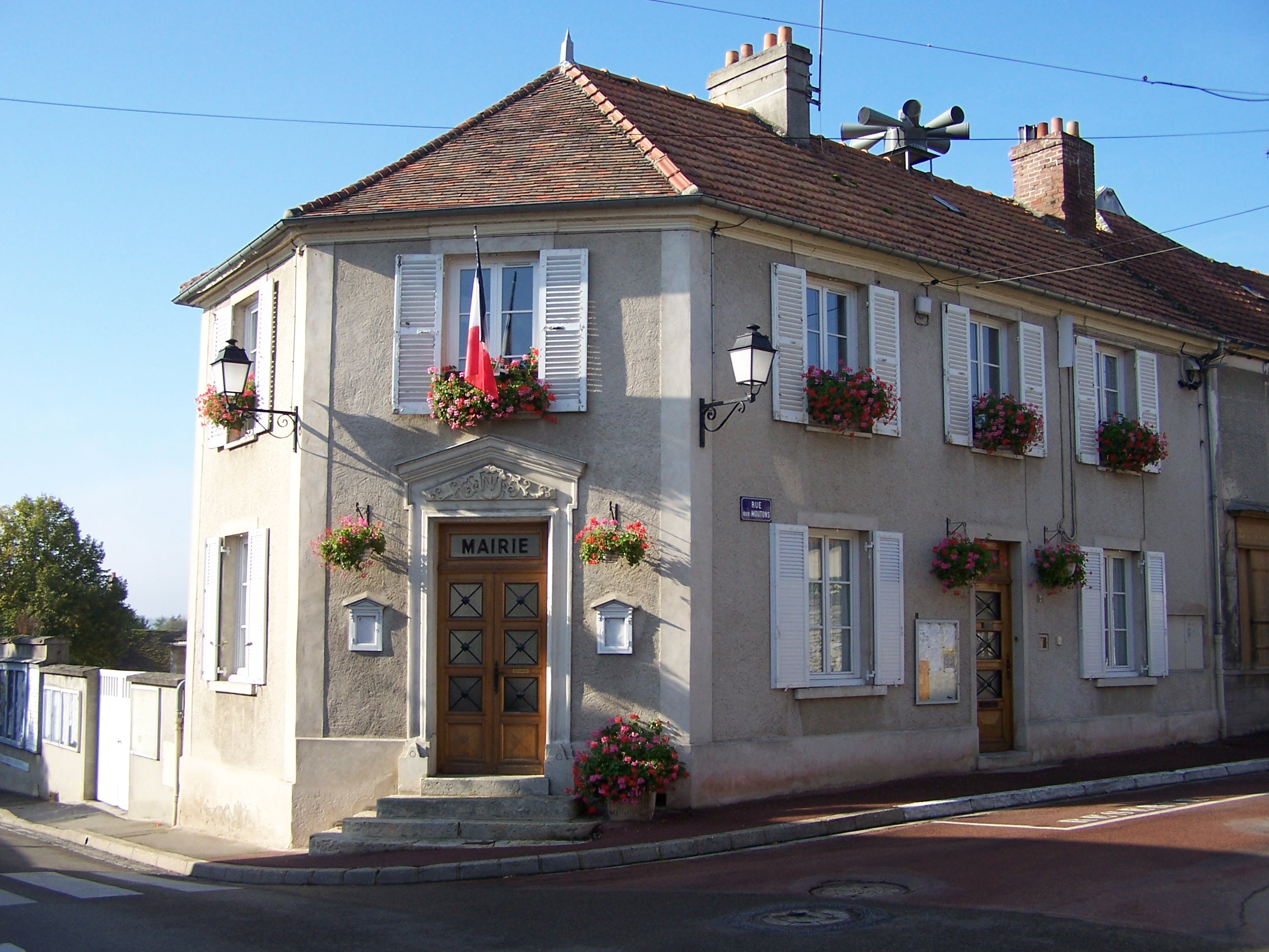 Mairie de Neauphle-le-Vieux (Yvelines, France)